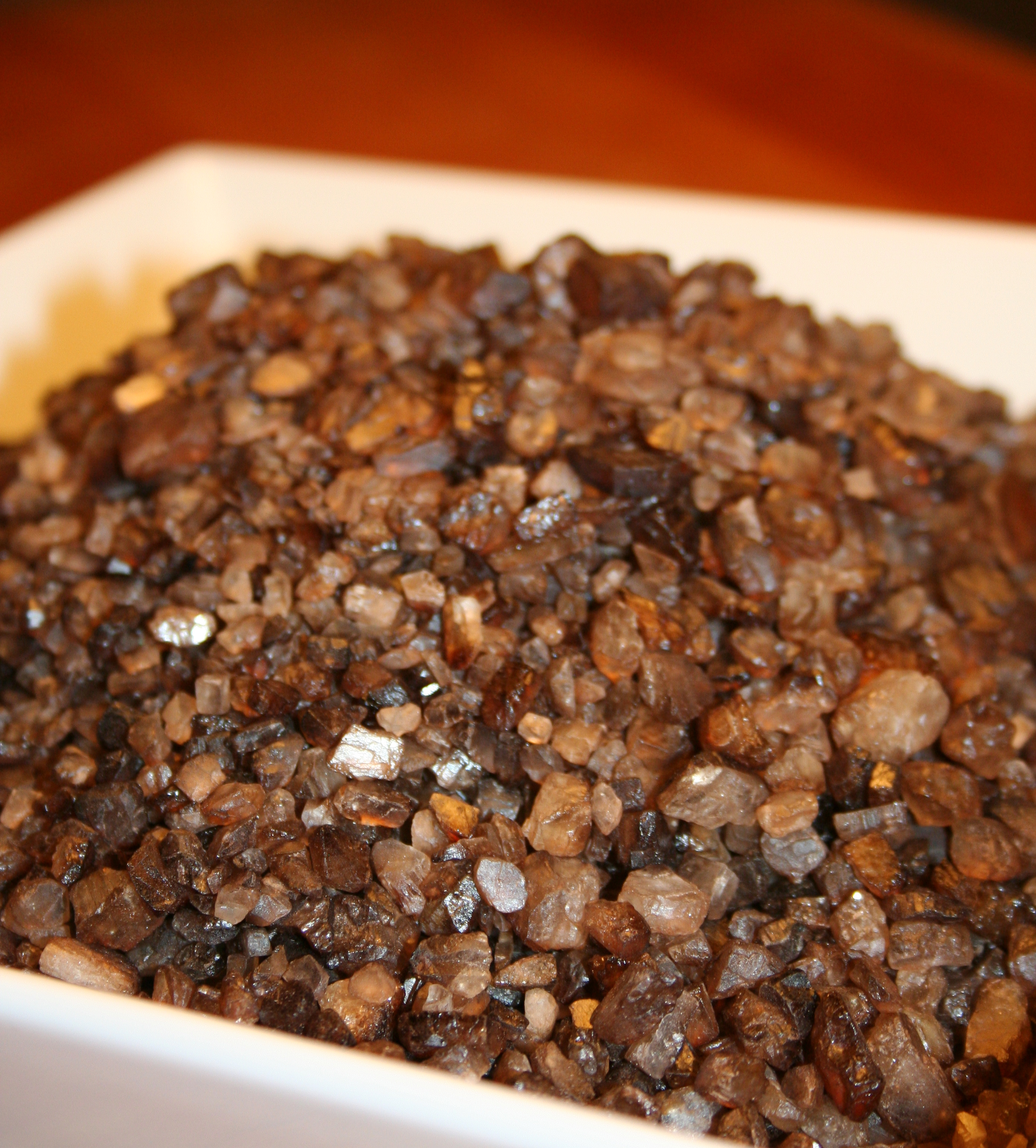 Mesquite Smoked Salt